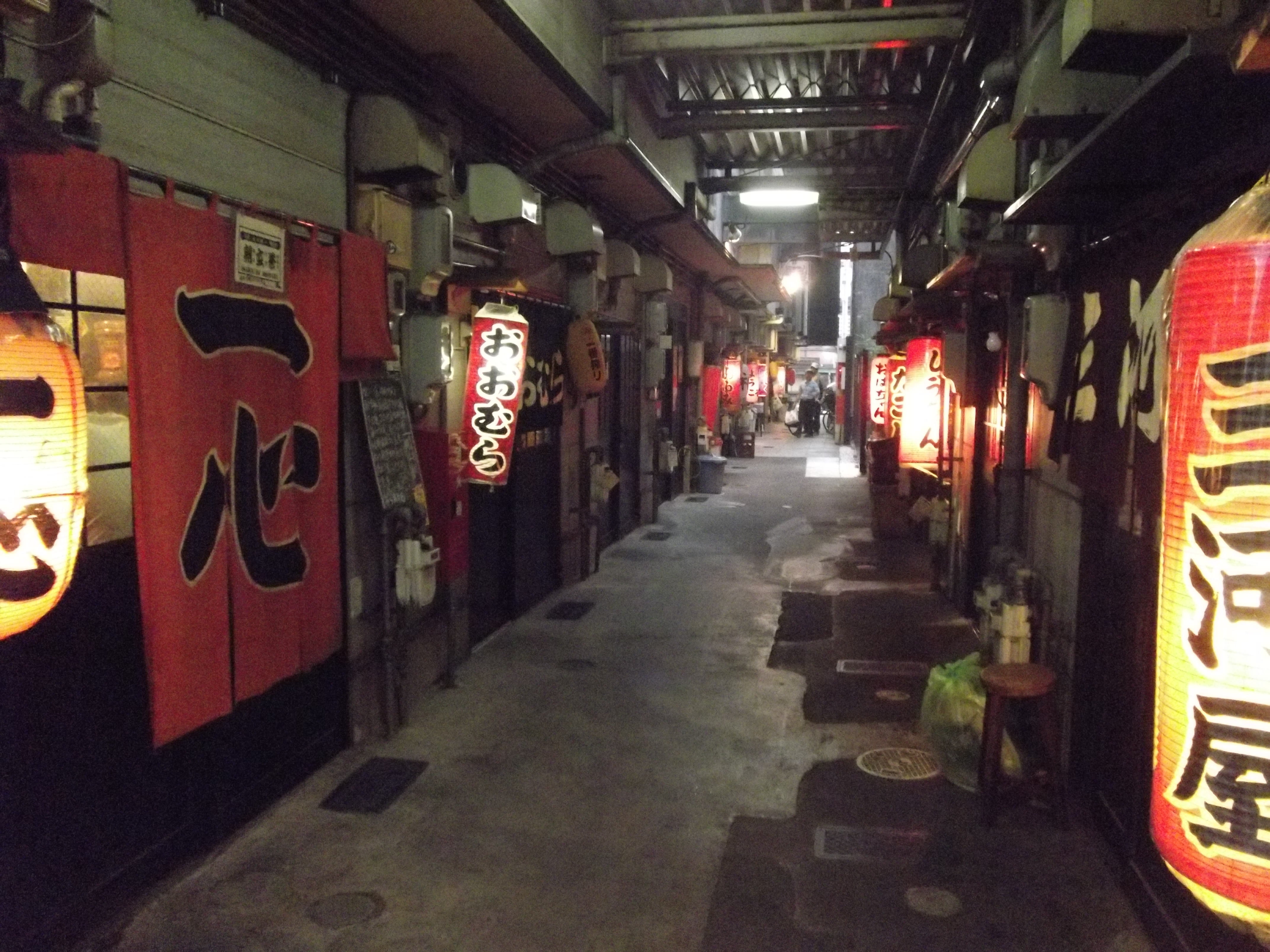 静岡おでん横丁。静岡市葵区。2014年9月6日撮影。